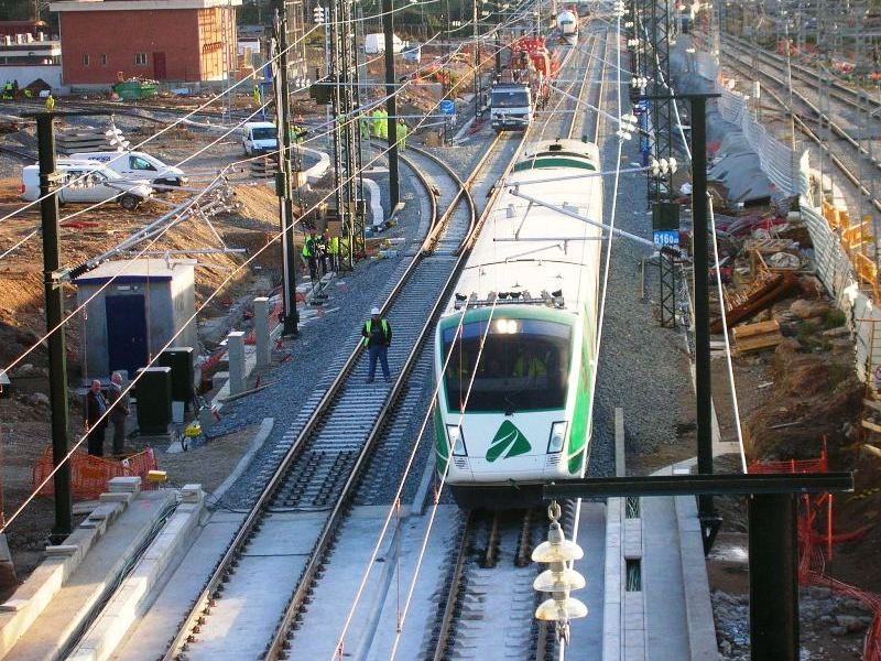 Bifurcació de Can Tunis